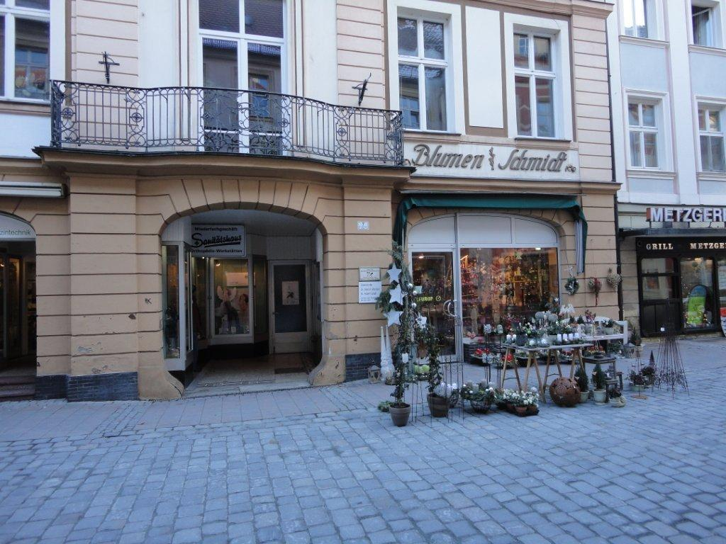 IIK - Standort Ansbach